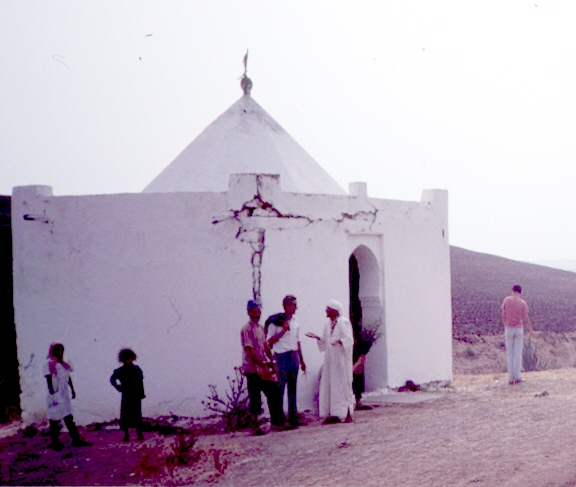 Tombeau d'un marabout dans la campagne marocaine (près de Meknès). Photo prise en juillet 1985 (M. Benoist)